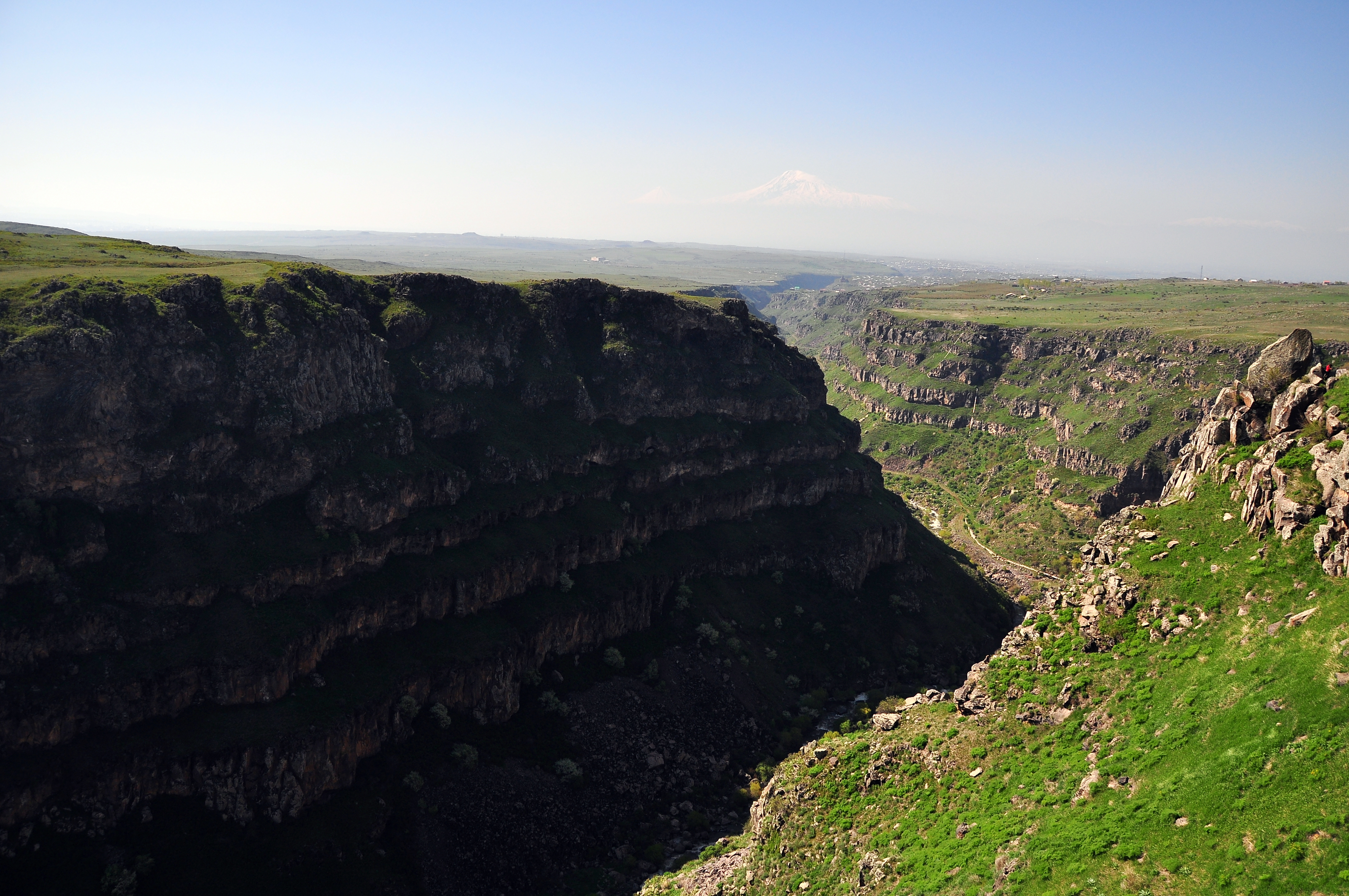 Քասախի կիրճը գարնանը